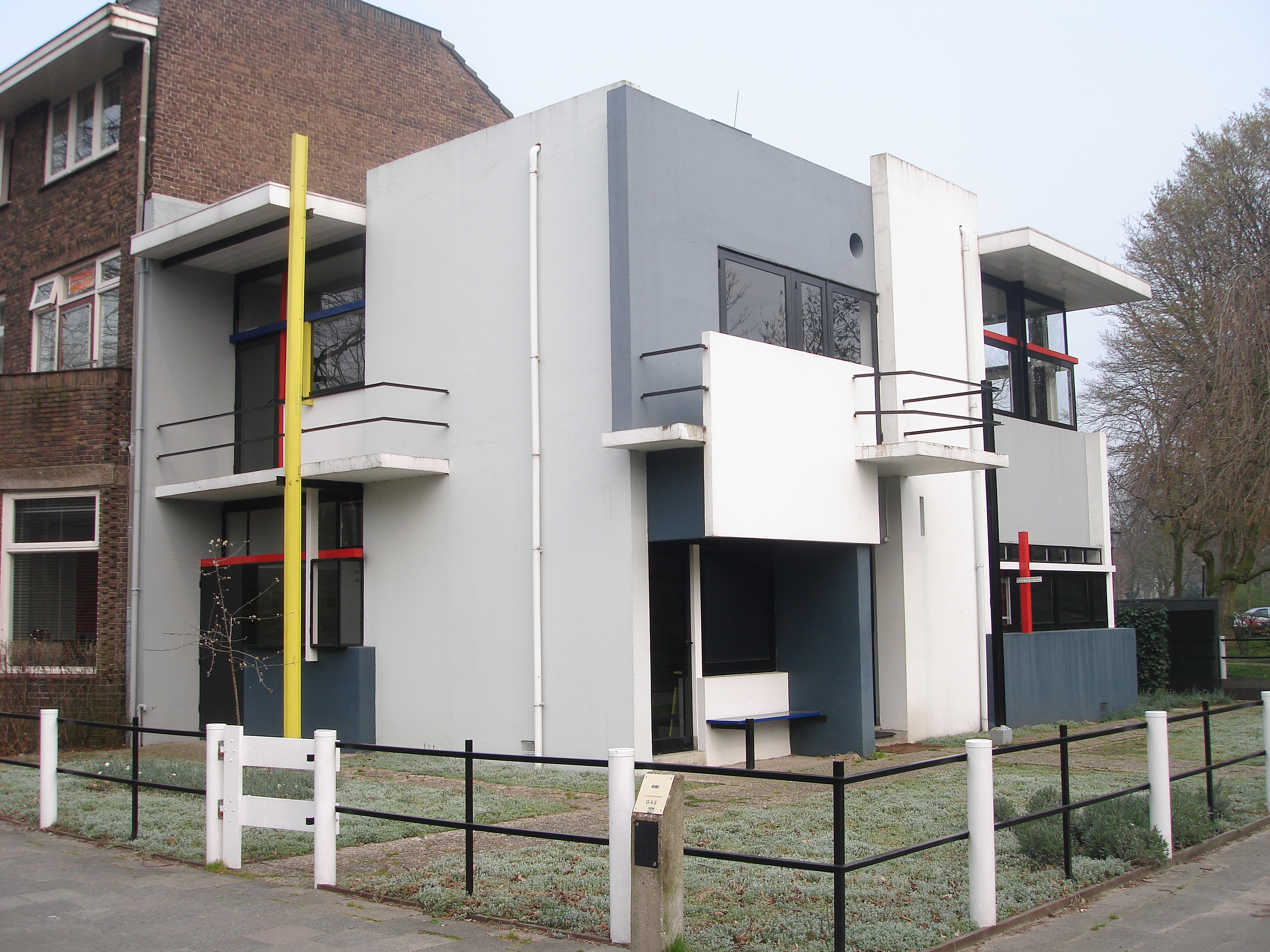 Rietveld Schröderhuis